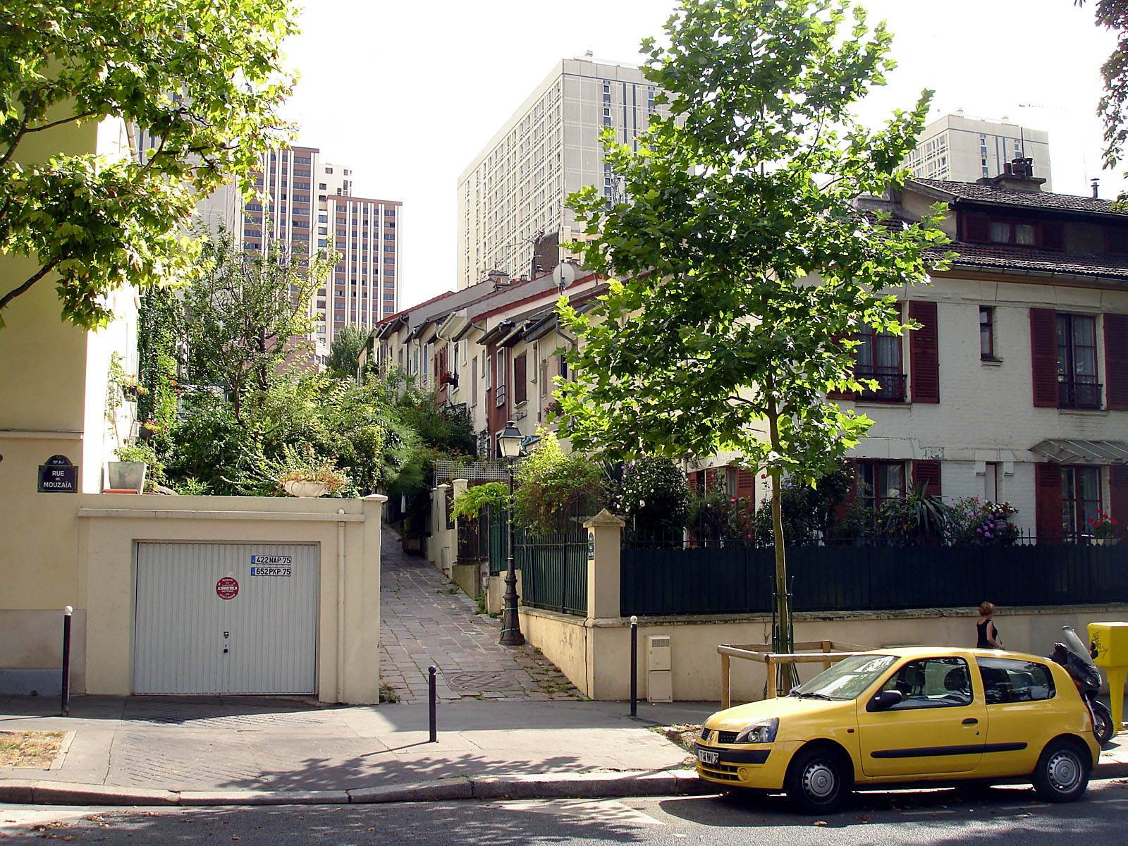 Maisons de ville de la villa de Bellevue, vue de la rue de Mouzaïa, dans le 19e arrondissement de Paris. Au fond, les tours de la place des Fêtes.